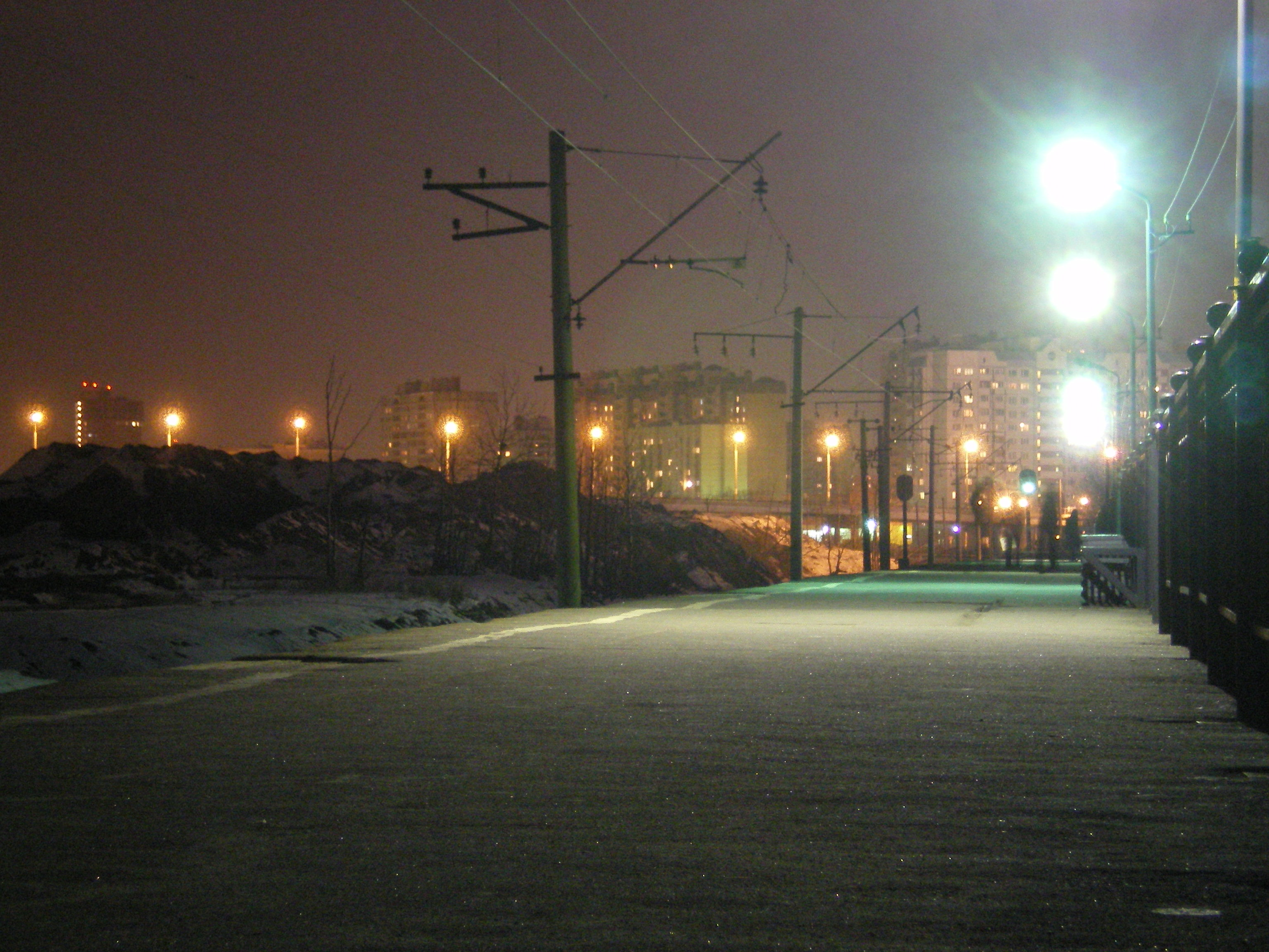 Платформа Яхтенная